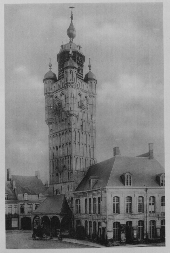 L'ancien Beffroi de Bergues (14ème-16ème siècle)